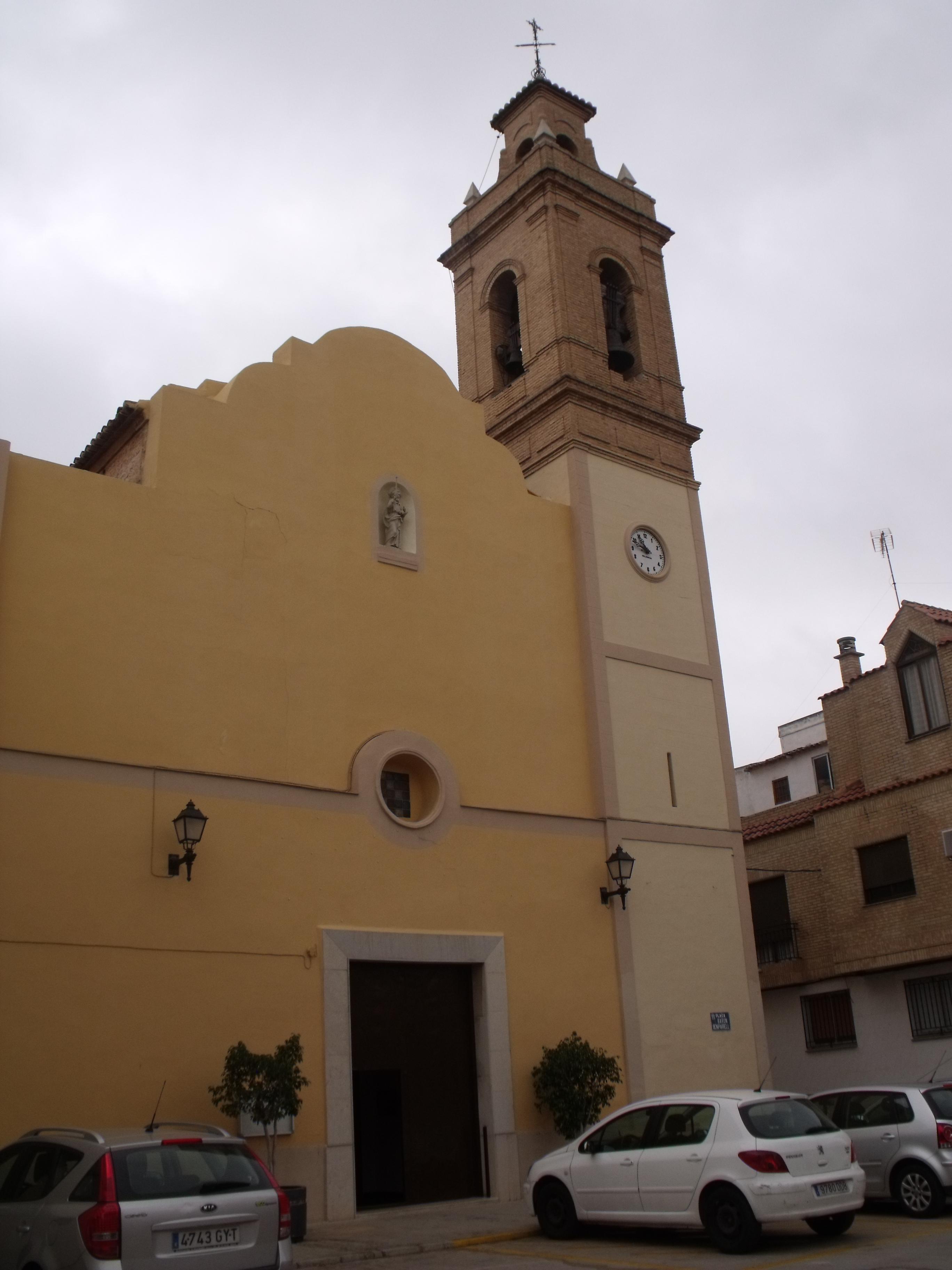 Església parroquial de Beniparrell.